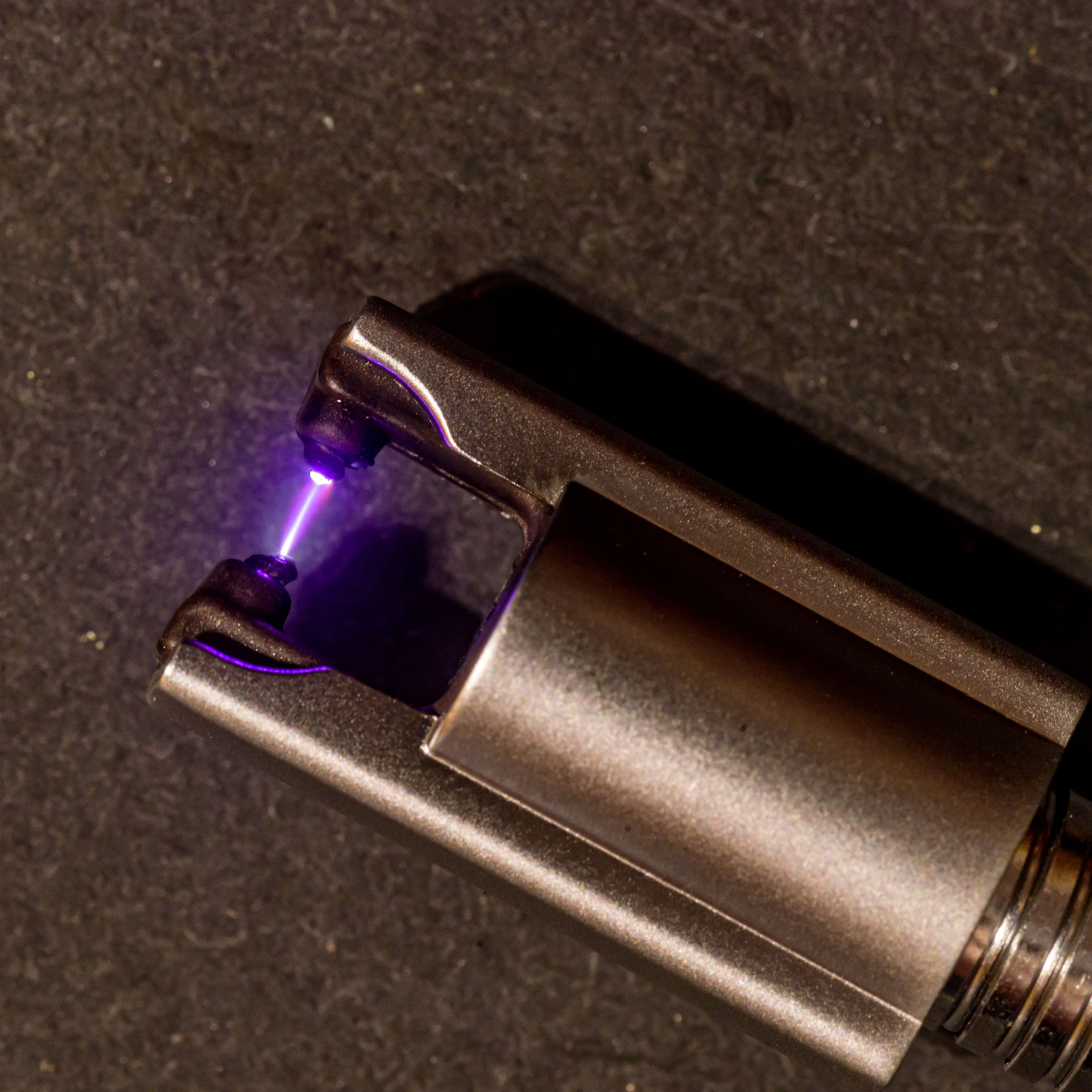 Der Kopf eines Lichtbogenfeuerzeugs in Betrieb